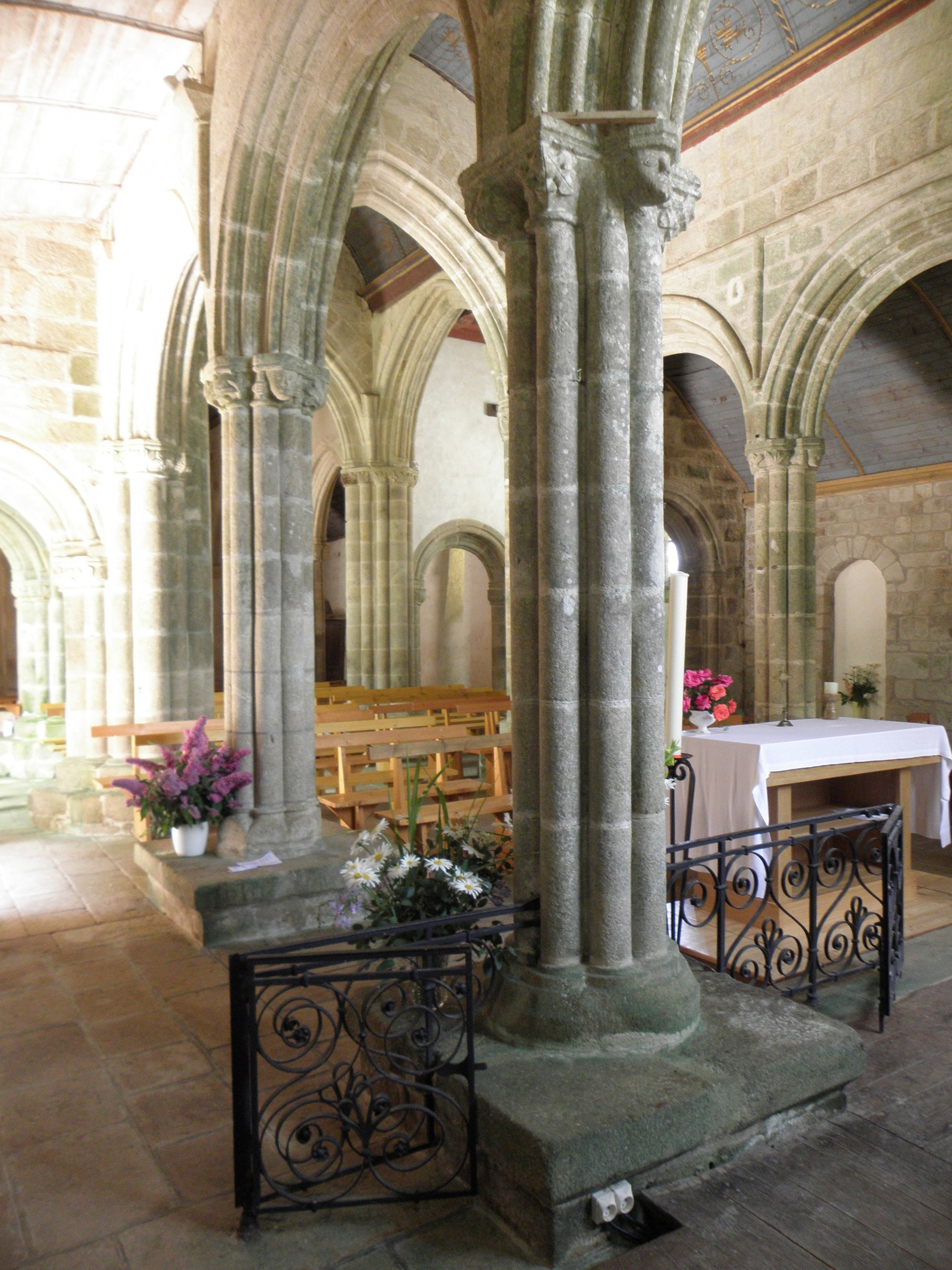 Chapelle Notre-Dame-de-Kérinec en Poullan-sur-Mer (29). Vue traversante du chœur.